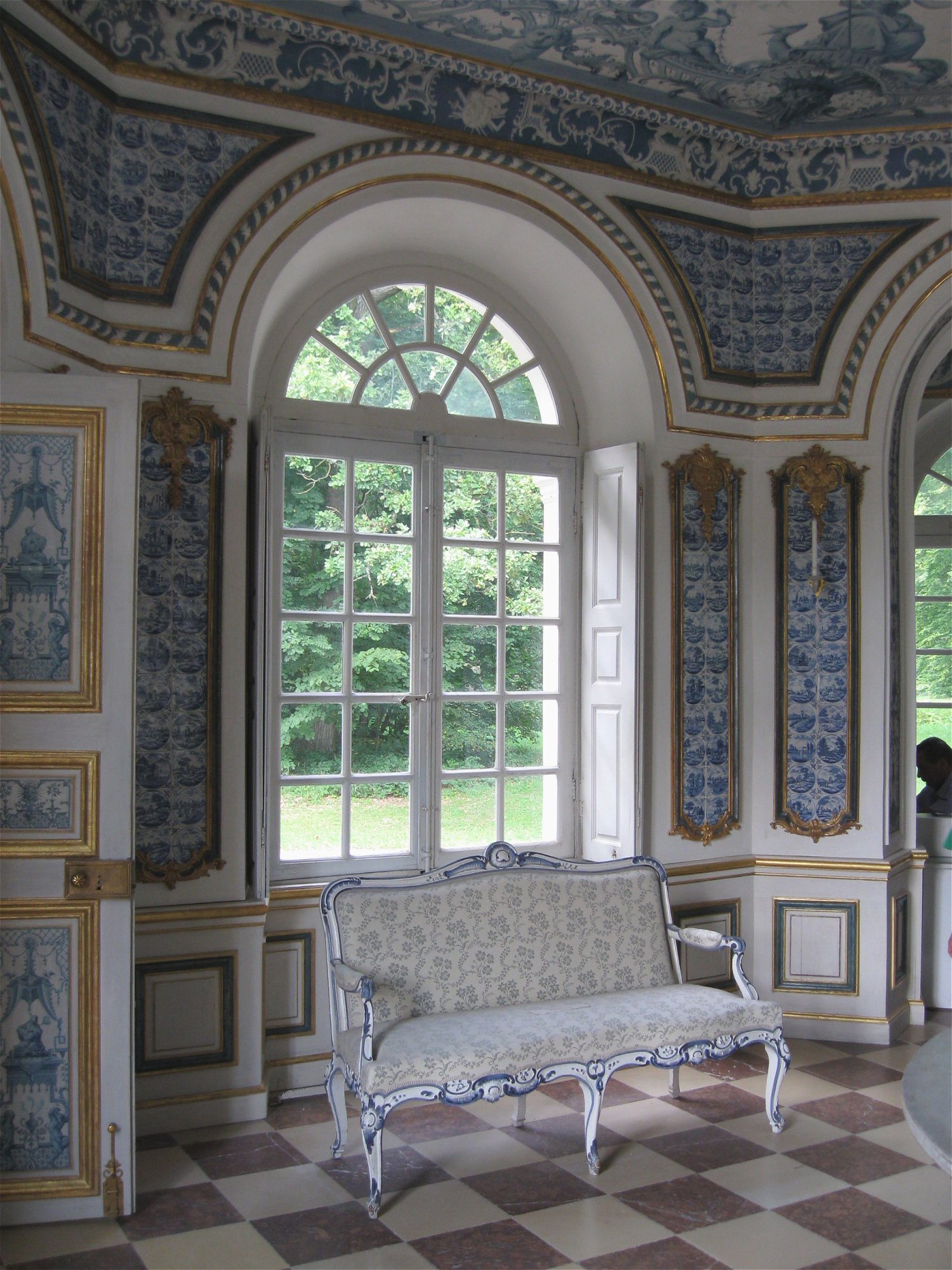 Saal im Erdgeschoß, Pagodenburg, Nymphenburg, München